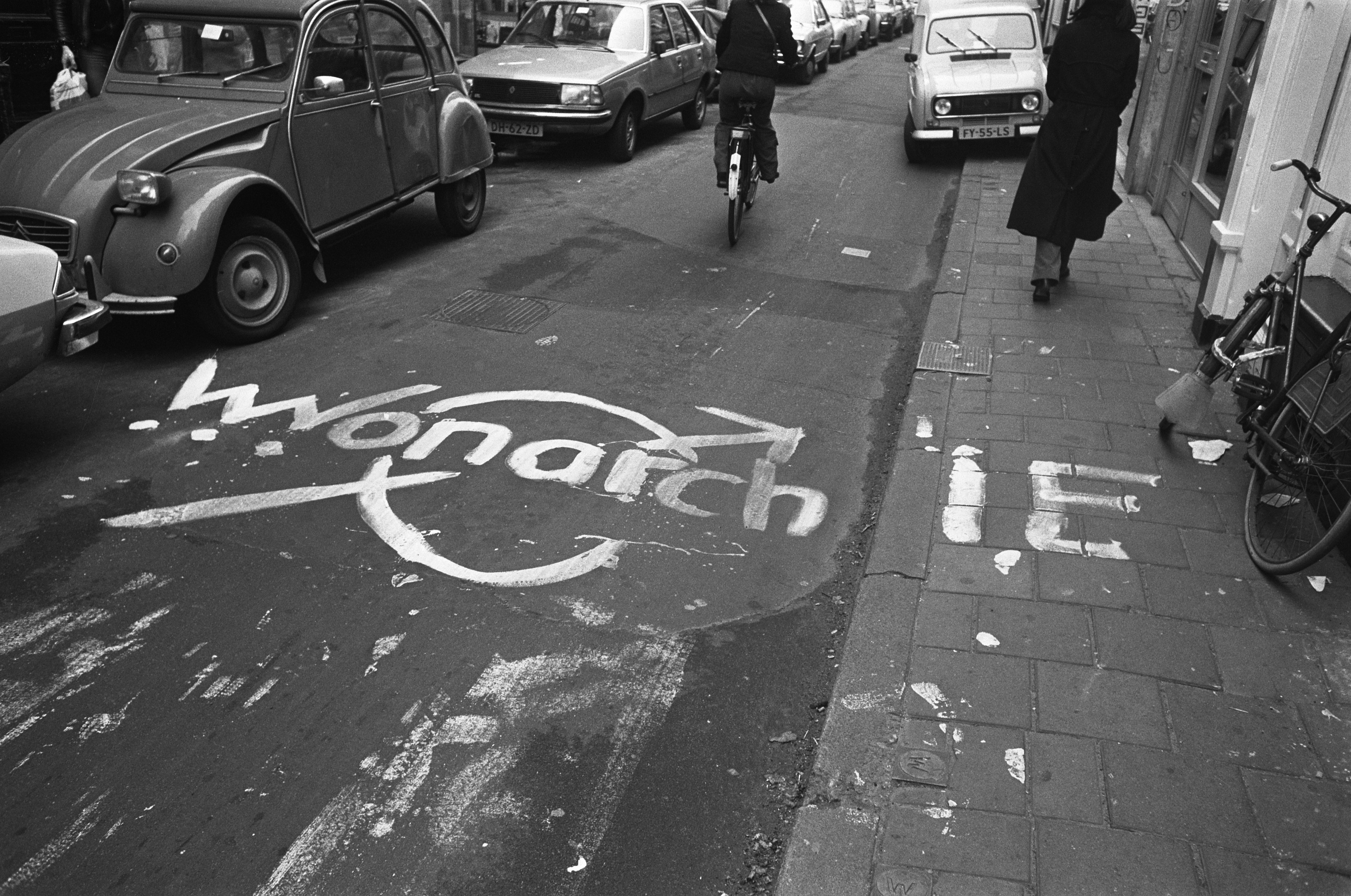 Collectie / Archief : Fotocollectie Anefo Reportage / Serie : [ onbekend ] Beschrijving : Teksten en spandoeken tegen Troonswisseling; tekst op wegdek: "Wonarchie" Datum : 28 april 1980 Trefwoorden : SPANDOEKEN, teksten, troonswisselingen Fotograaf : Bogaerts, Rob / Anefo Auteursrechthebbende : Nationaal Archief Materiaalsoort : Negatief (zwart/wit) Nummer archiefinventaris : bekijk toegang 2.24.01.05 Bestanddeelnummer : 930-7965